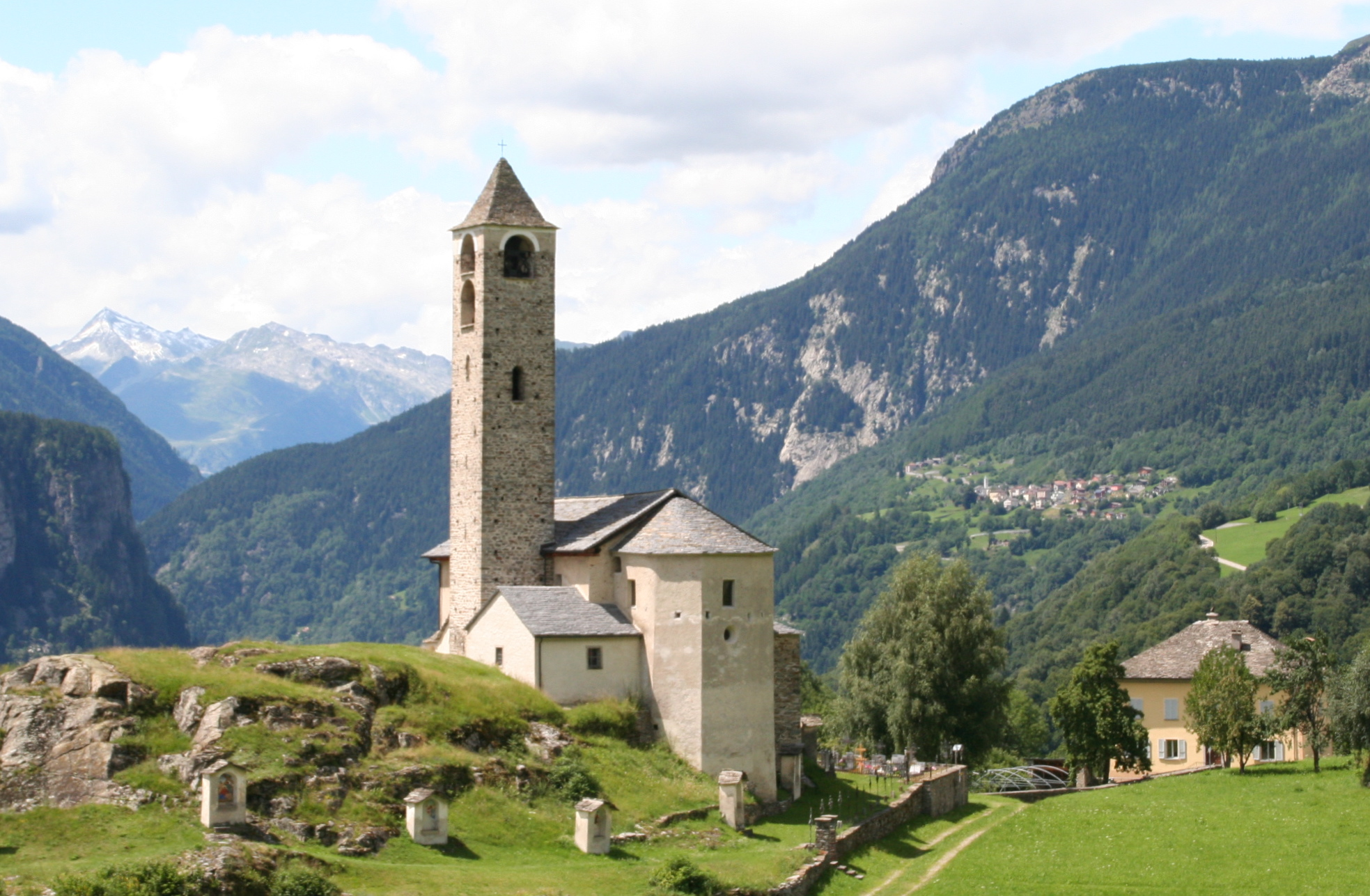 Kirche Santi Lorenzo e Agata : Ansicht von Südosten